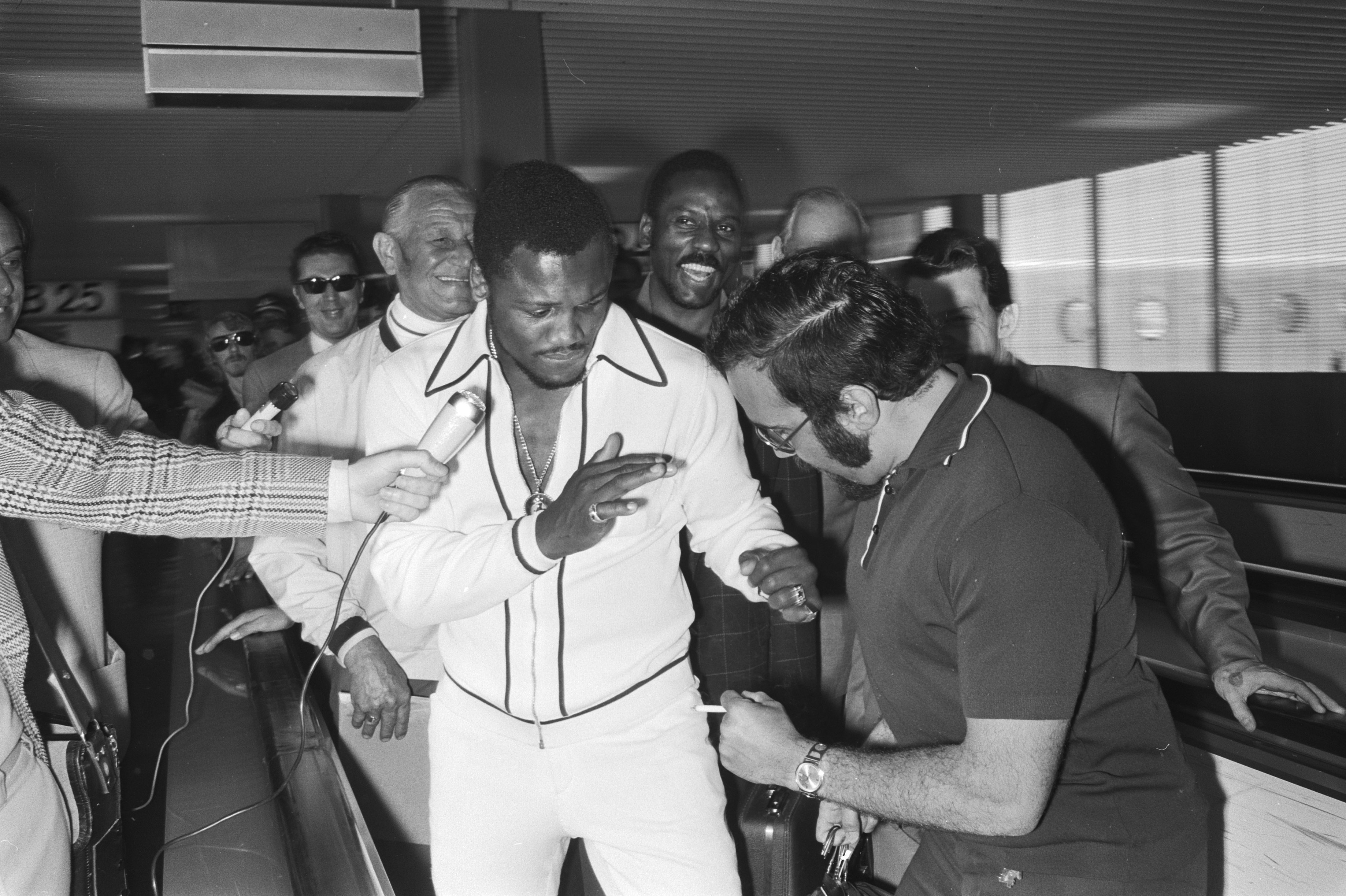 Collectie / Archief : Fotocollectie Anefo Reportage / Serie : [ onbekend ] Beschrijving : Aankomst van Joe Frazier op Schiphol Datum : 15 mei 1971 Locatie : Noord-Holland, Schiphol Trefwoorden : aankomst en vertrek, musici, vliegvelden Persoonsnaam : Frazier, Joe Fotograaf : Peters, Hans / Anefo Auteursrechthebbende : Nationaal Archief Materiaalsoort : Negatief (zwart/wit) Nummer archiefinventaris : bekijk toegang 2.24.01.05 Bestanddeelnummer : 924-5570